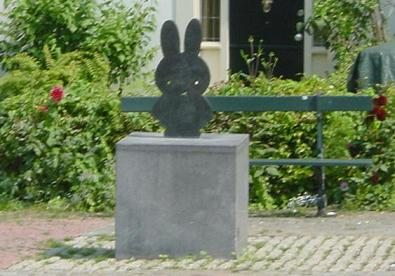 Miffy statue at her own square, Nijntje Pleintje, in Utrecht.